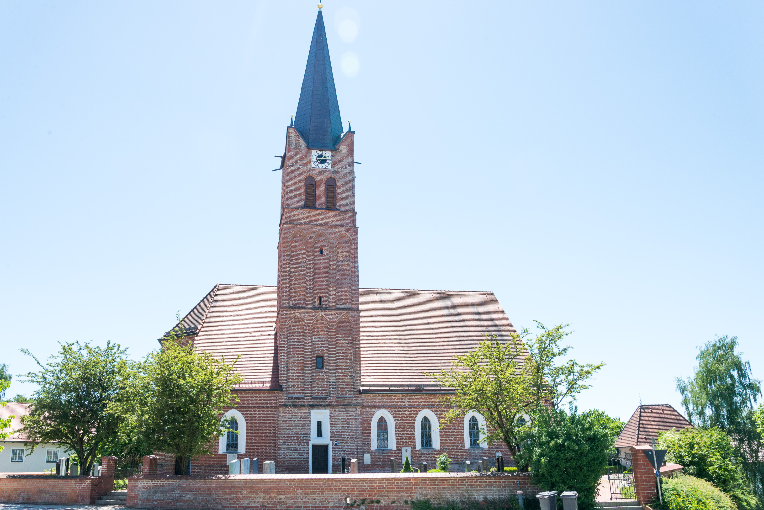 Katholische Pfarrkirche St. Johann Baptist: Saalkirche, spätgotischer ziegelsichtiger Backsteinbau, 15. Jahrhundert, Wandpfeilersaal in der ersten Hälfte des 18. Jahrhunderts nördlich erweitert, nördlich Chorflankenturm mit Spitzhelm über Eckzinnen, teilweise mit Spitzbogen verblendet; mit Ausstattung.This is a photograph of an architectural monument.